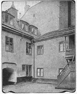 Alfred Nobels födelsehus på Norrlandsgatan 11, gården